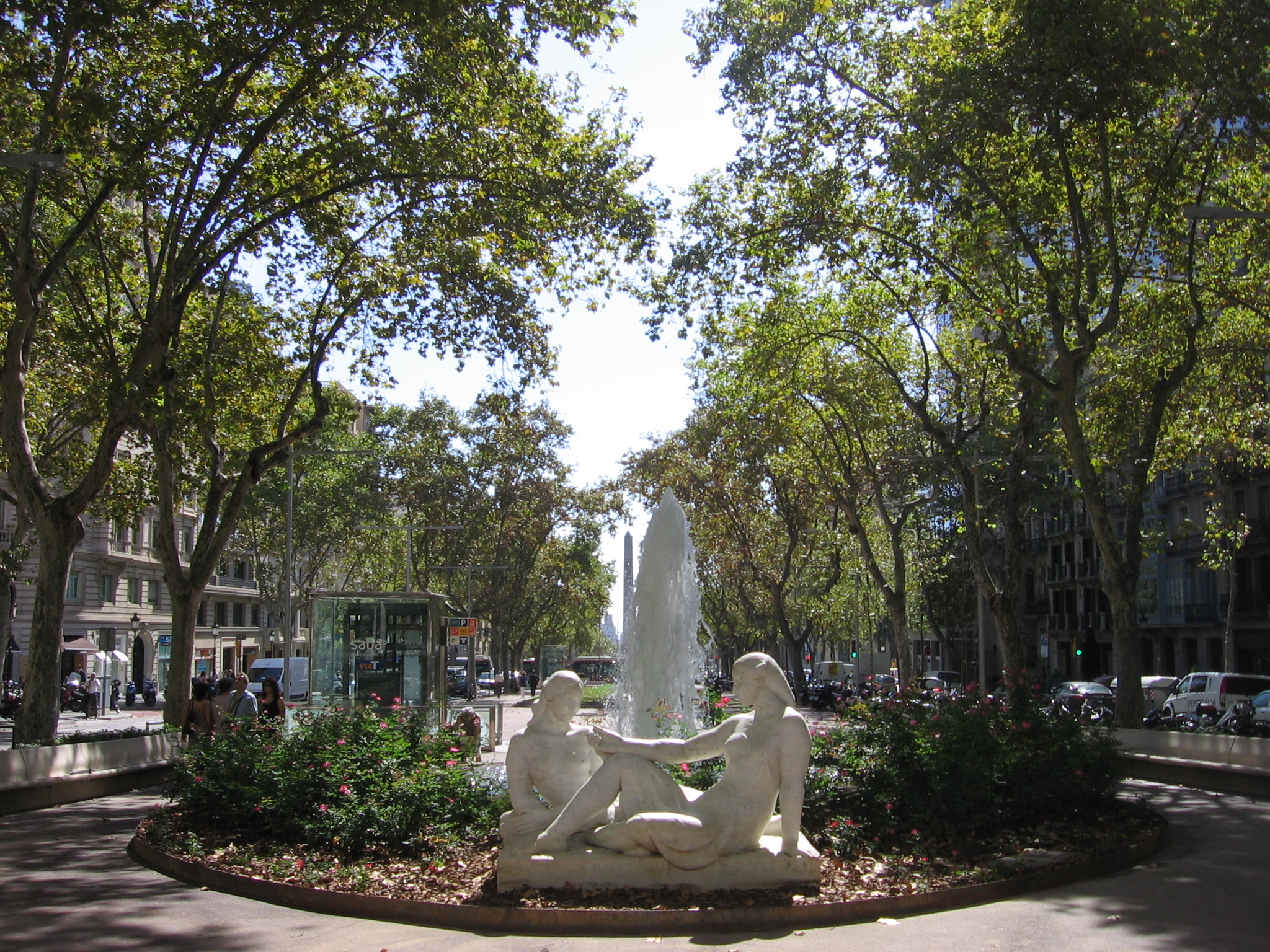 Jardines de Salvador Espriu.